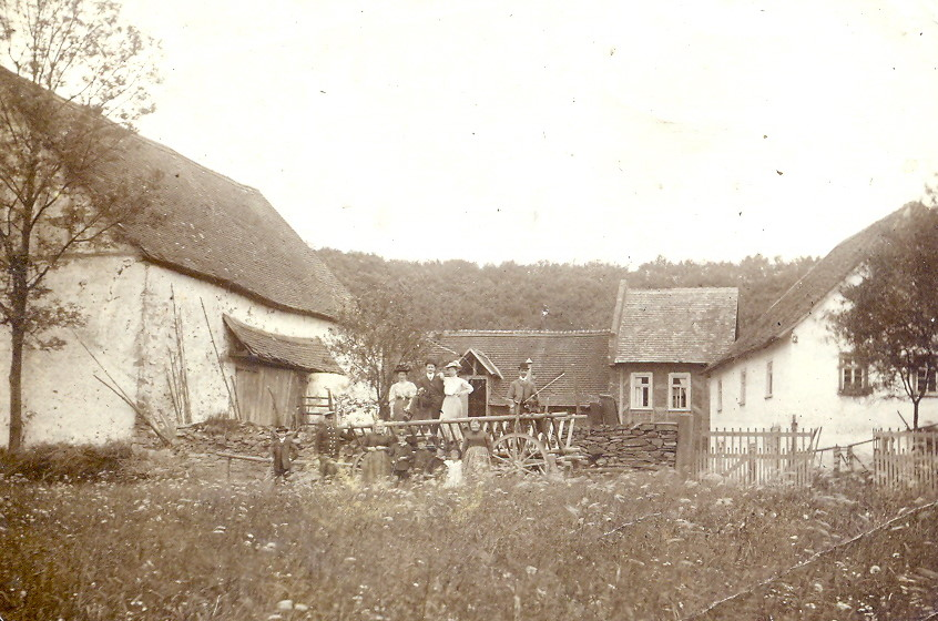 Herrnmuehle bei Kransberg (~1907)